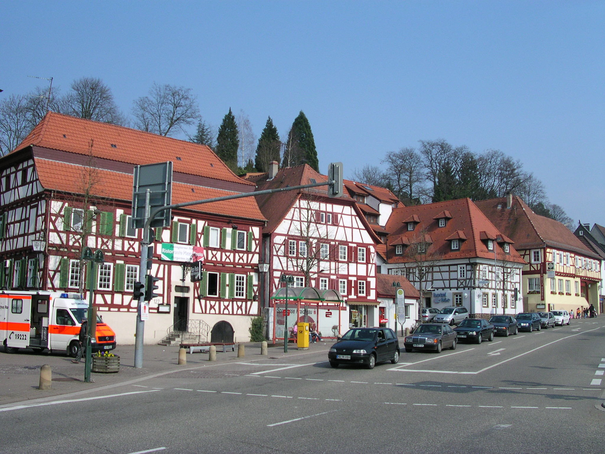 Sinsheim. Die Gebäude in der Hauptstraße 127, 129, 131 und 133 sind typische Fachwerkhäuser für Sinsheim und die Region, erbaut im 18. Jahrhundert.